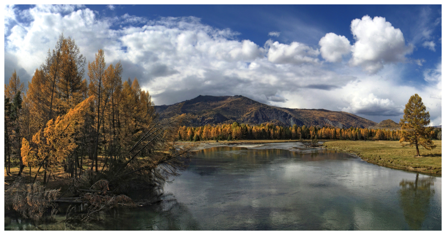 Сайлюгемский национальный парк: Кош-Агачский район, Алтай This image is related to the protected area of Russia number 0400007